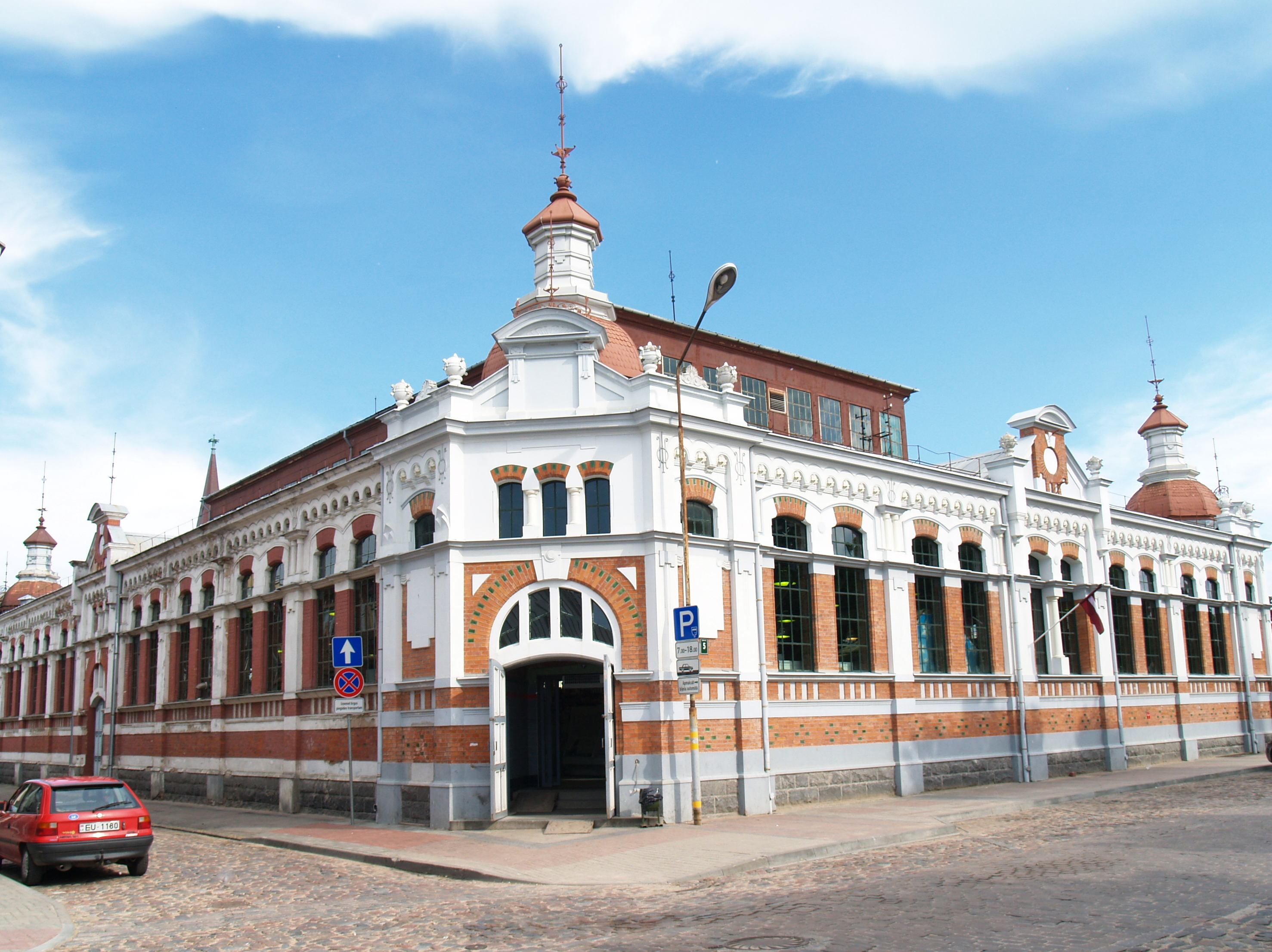 Pētertirgus (Petermarket)